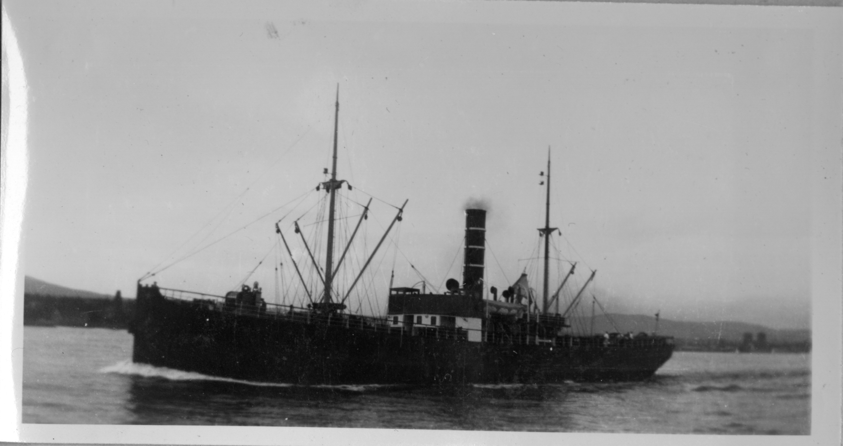 Bildet er hentet fra Arkivverket. B.D.S. Bergen. Ca. 800 T.DW. V/Oslo Arkivinstitusjon : Statsarkivet i Kongsberg Arkivnavn : Telemark politikammer Sted : Norge, Oslo, Oslo, Oslo Emneord: Skip, Båt, Hav Avbildet